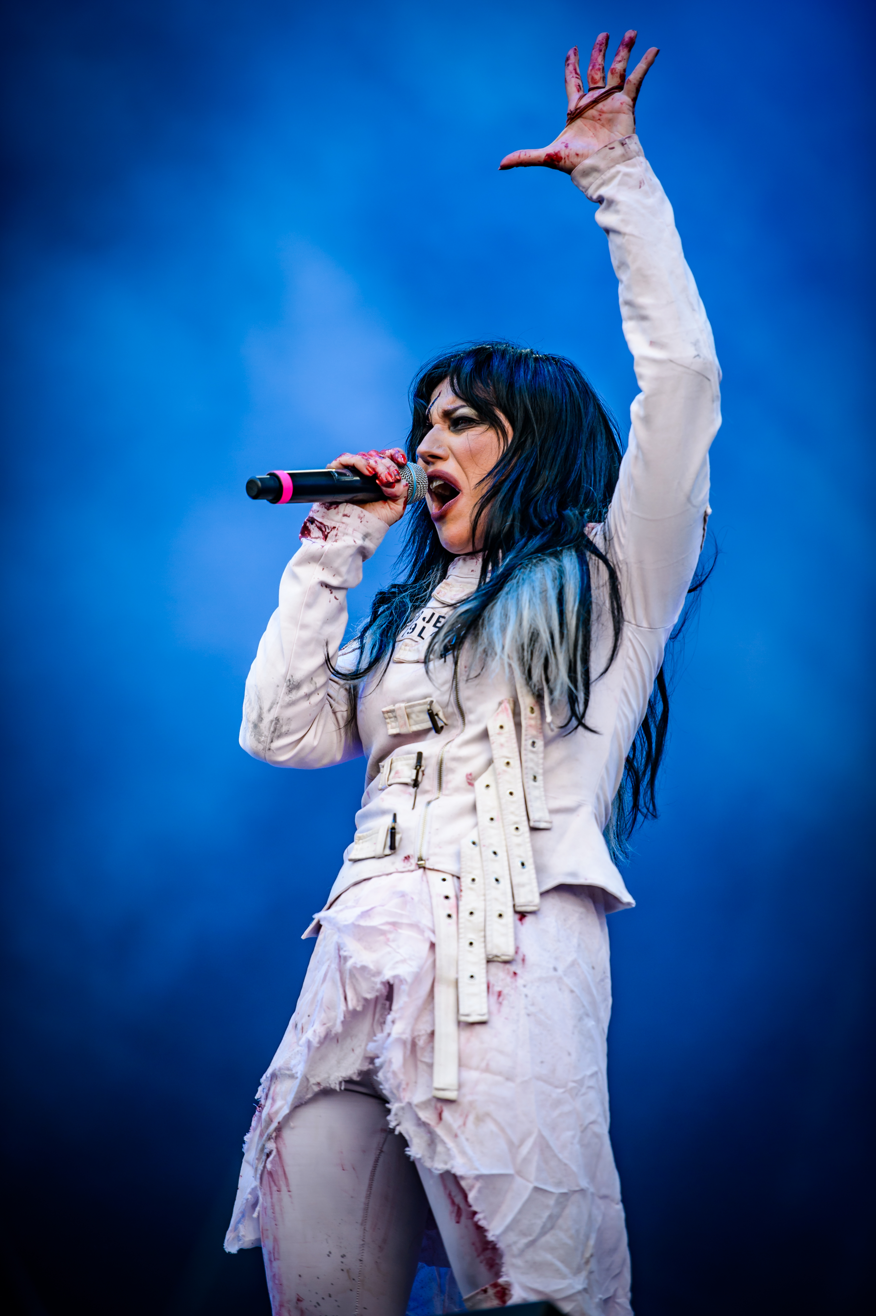 'RockHarz Open Air 2017; Ballenstedt': 'Lacuna Coil'